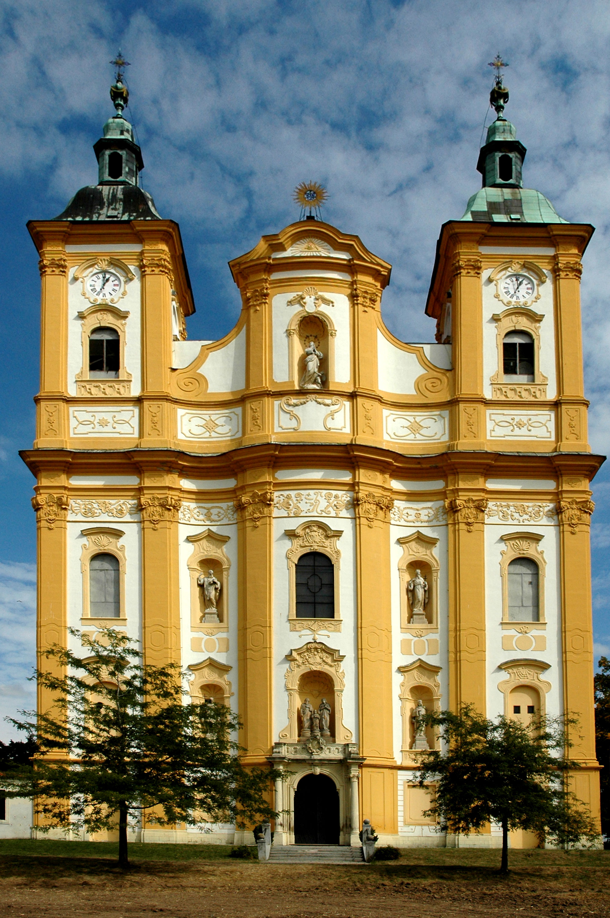 Kostel byl postaven v letech 1734 -1756 a svou délkou 60 metrů, šířkou 29 metrů, výškou lodi 30 metrů patří k nejvštím na moravské Hané.